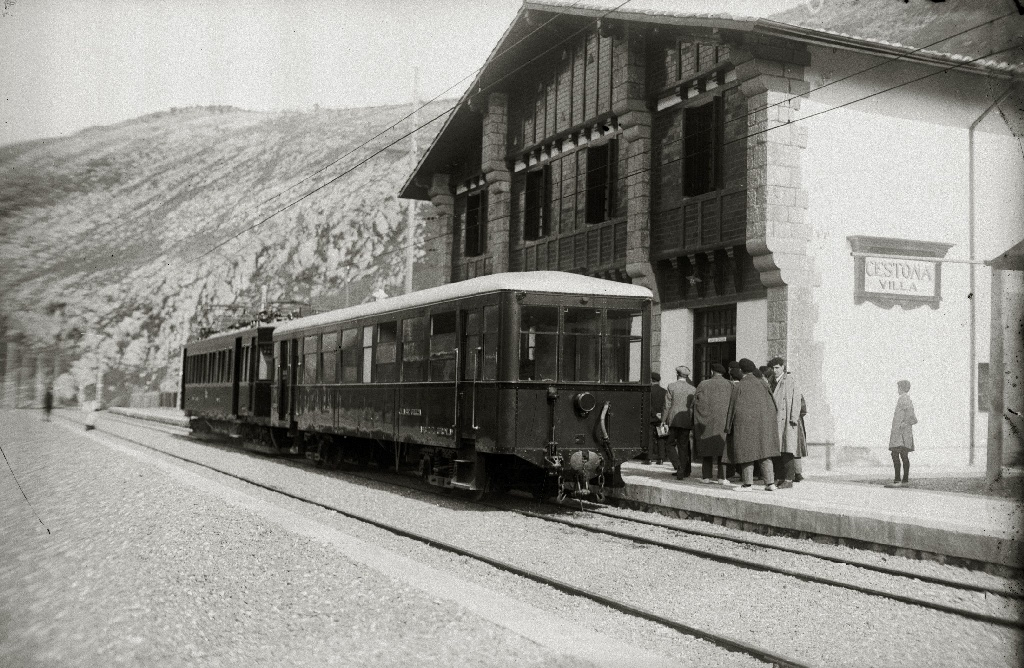 Título original: Ferrocarril del Urola, estación de Zestoa (1/1) Localización: Cestona (Guipúzcoa)